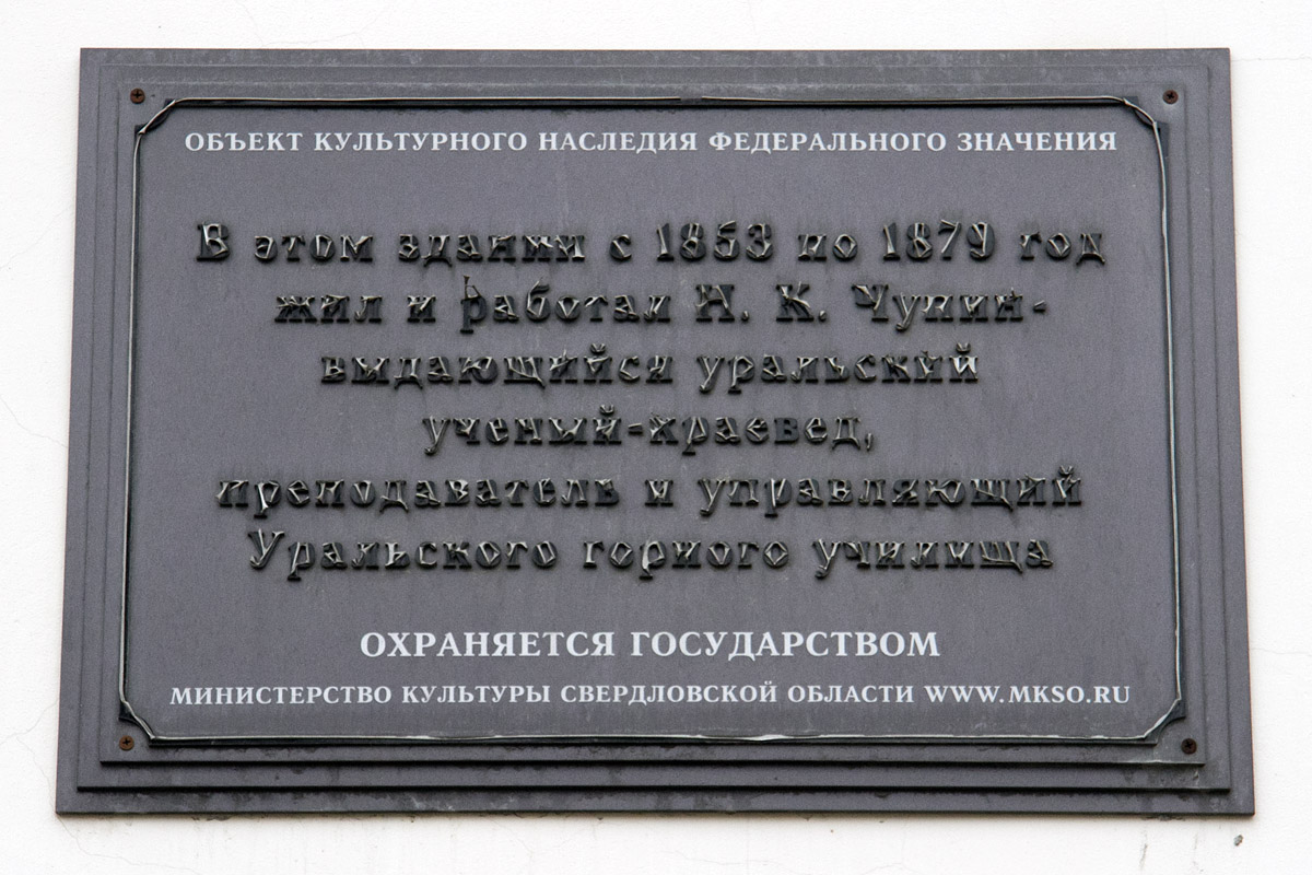 Табличка на фасаде Гимназия № 9, посвященная Чупину Н.К.